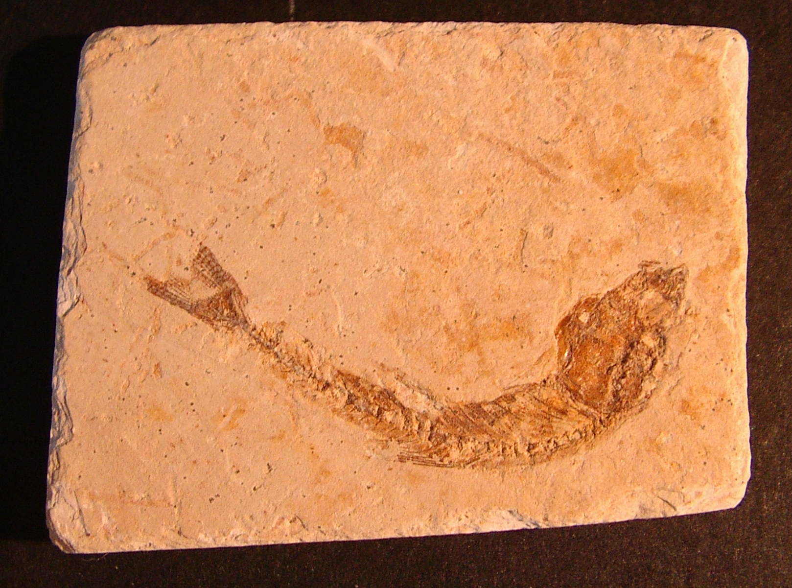 Author: Daniel Miłaczewski